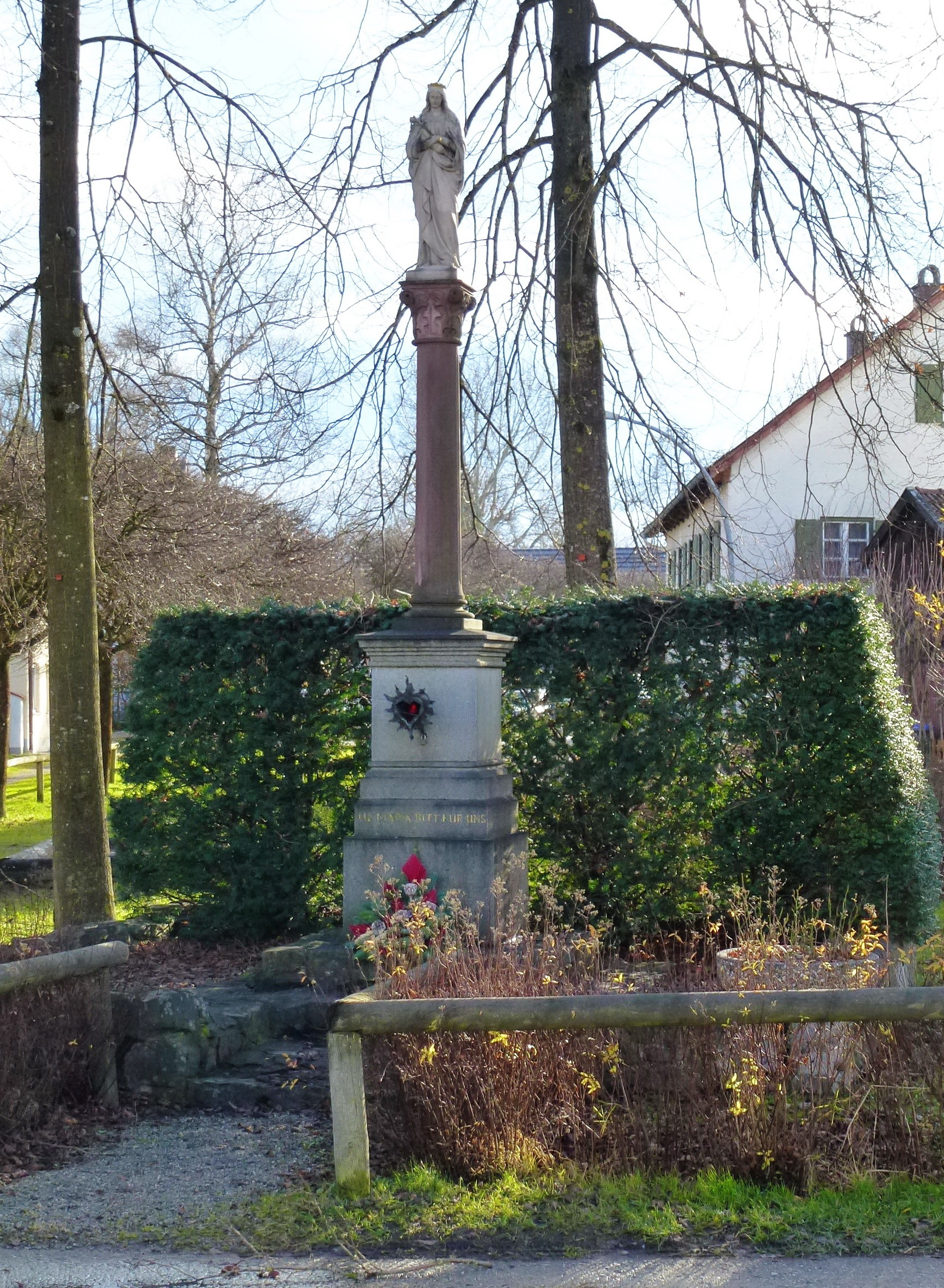 Einfache Statue mit "Flammendem Herz"